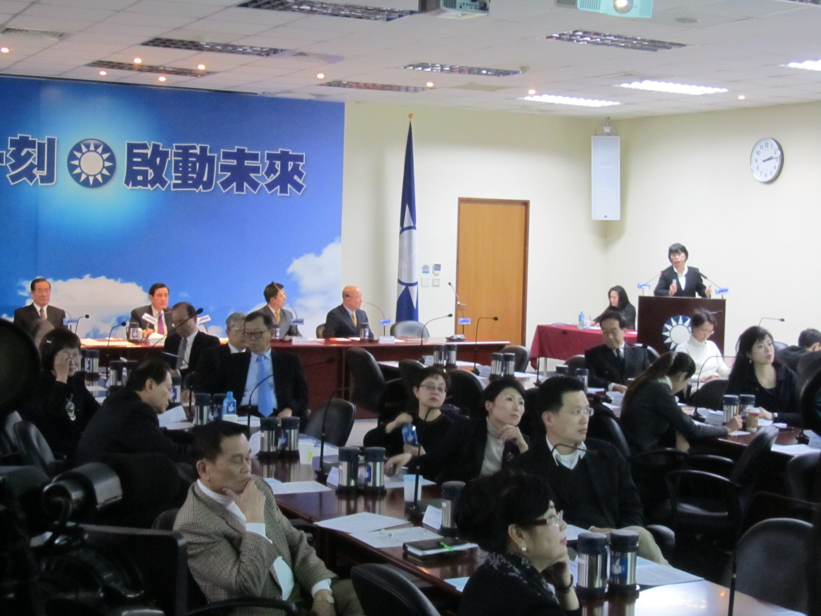 中文（台灣）: 國民黨星期三舉行中常會(美國之音張佩芝拍攝)